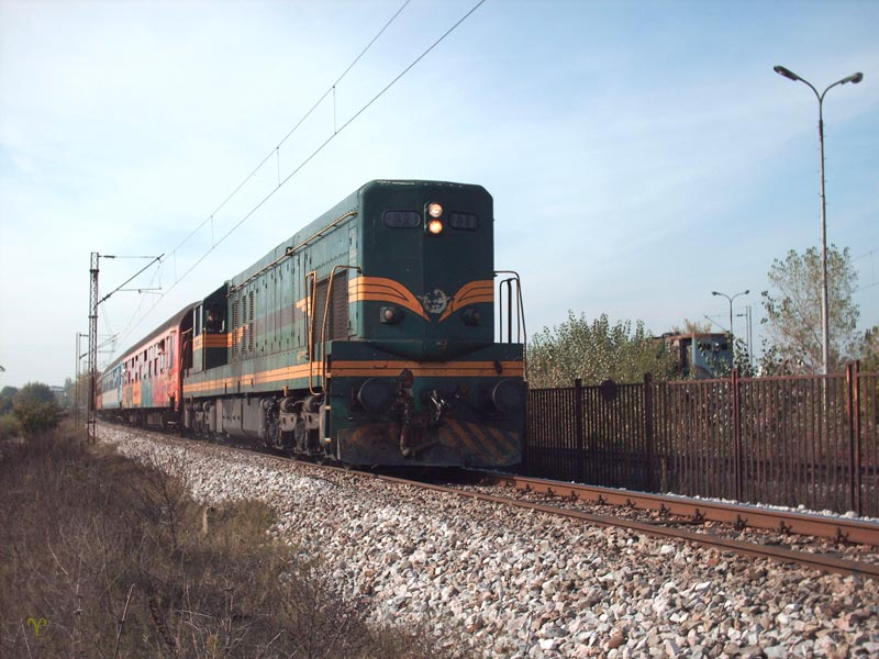 Voz - kompozicija (Kolekcija na Vladimir Petkov)